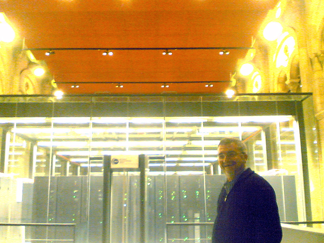 MareNostrum, Supercomputer, director Mateo Valero